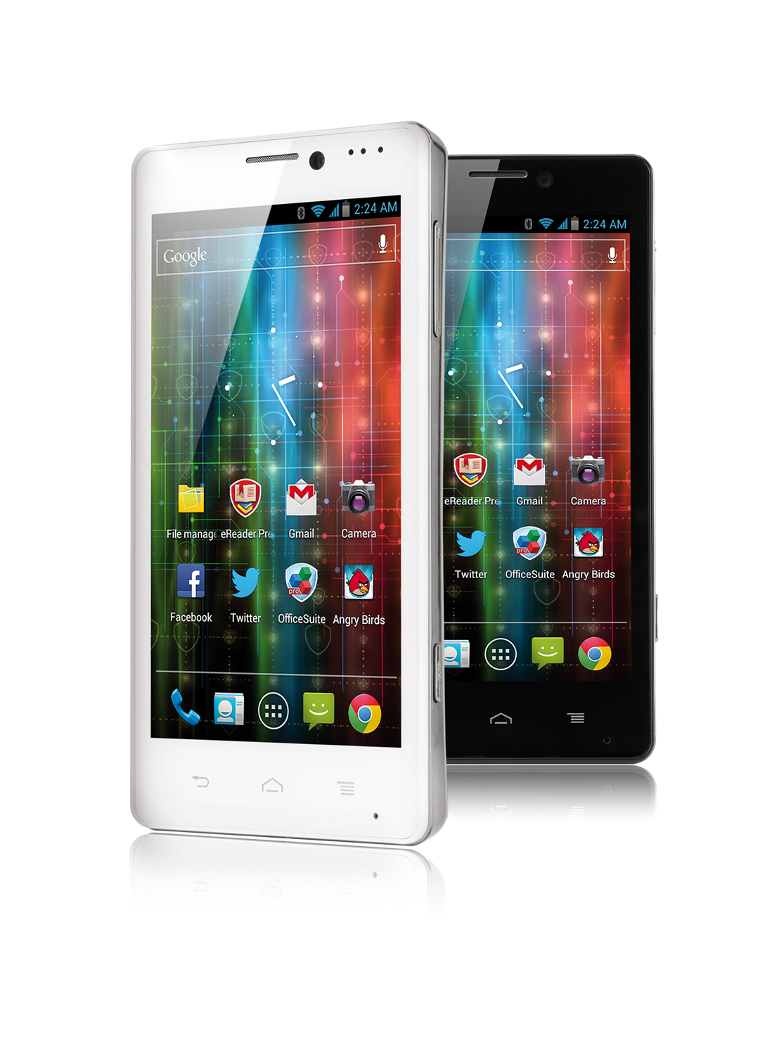 Первый смартфон Prestigio на базе процессора Intel® Atom™